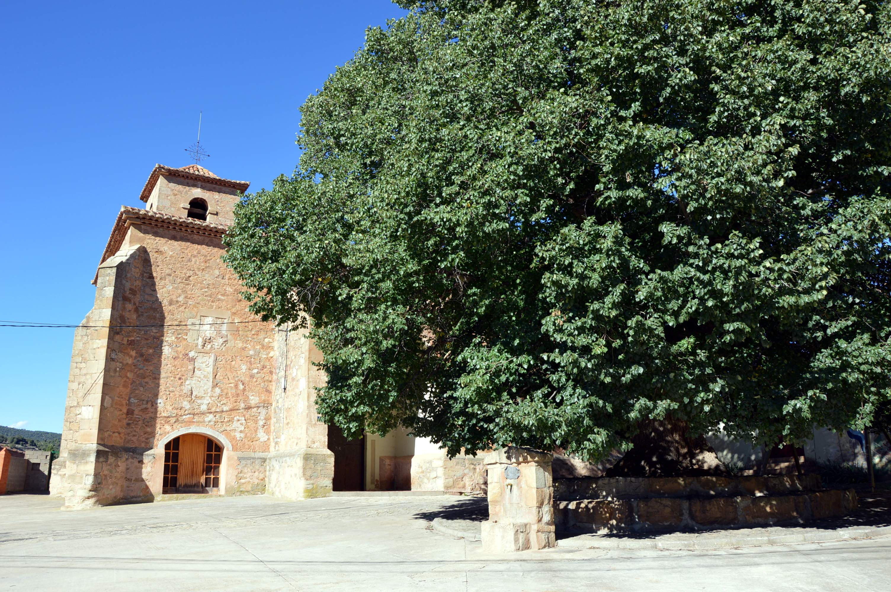 Detalle del olmo común existente frente a la iglesia parroquial de San Fabián y San Sebastián, Alobras (Teruel), año 2015.